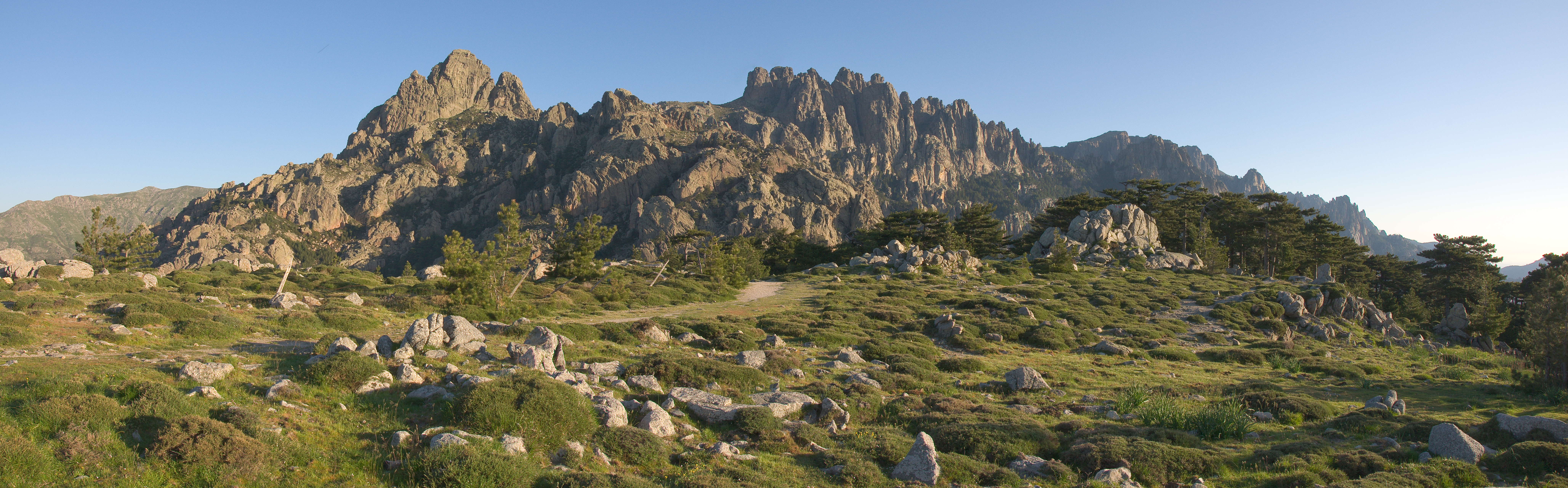 Vue vers le nord depuis le col de Bavella.